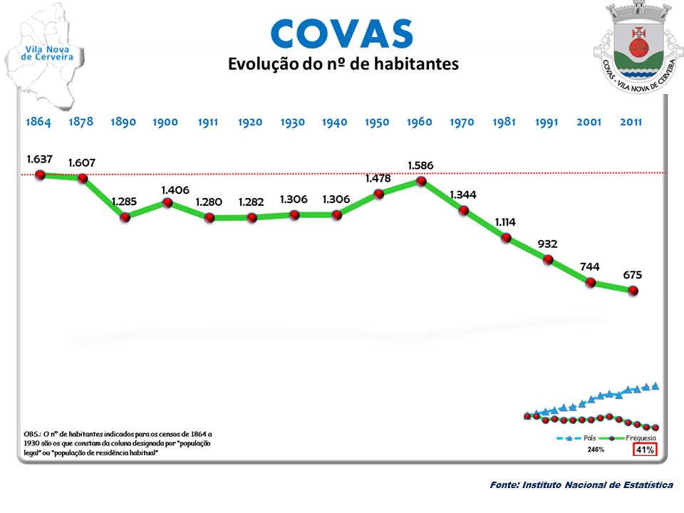 Censos 1864/2011